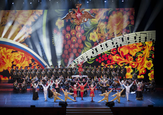 Академический ансамбль песни и пляски Российской Армии имени А. В. Александрова